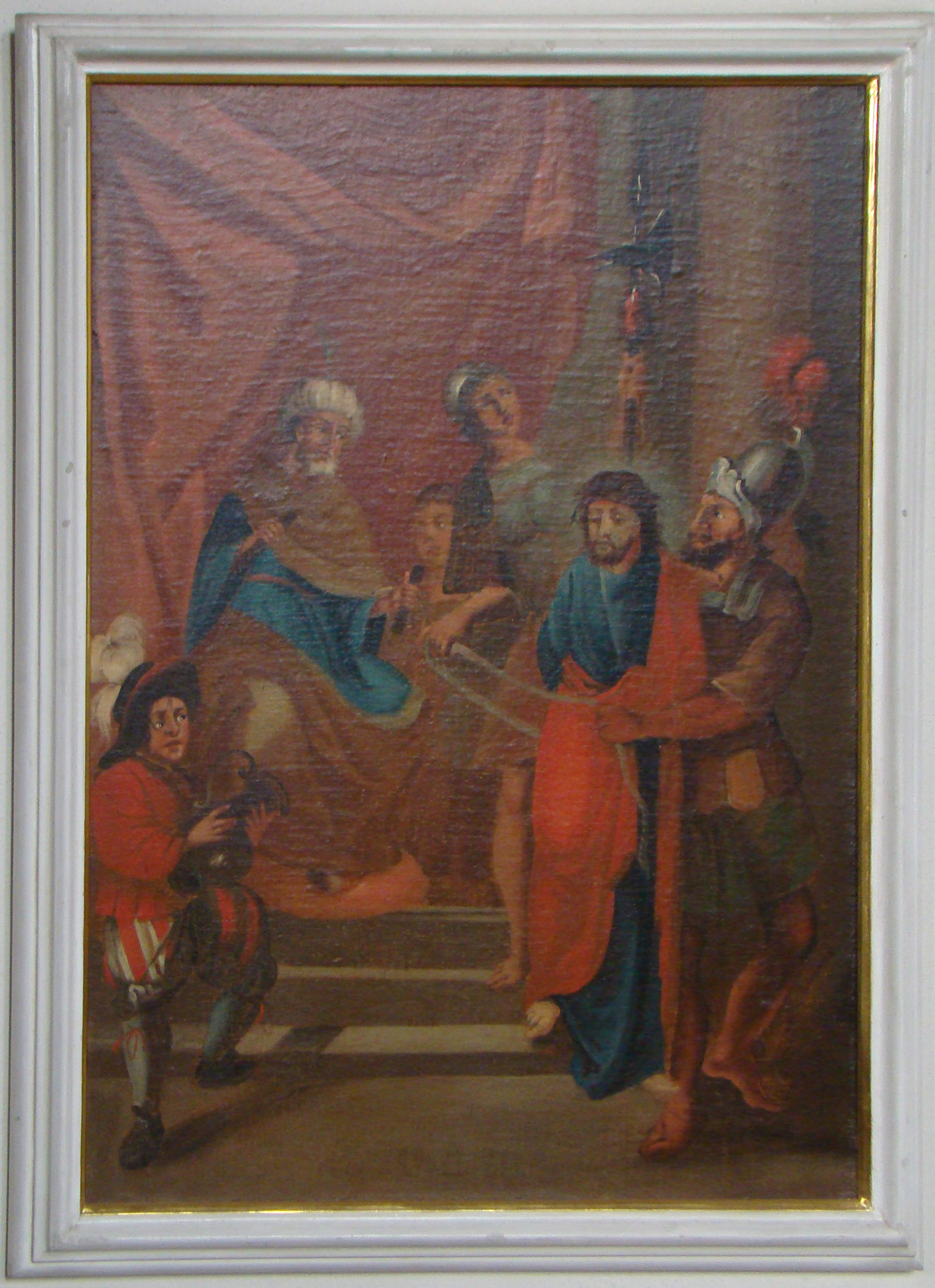 St. Laurentius in Wiesloch, Teilbild der Passionsfolge an den Seitenwänden